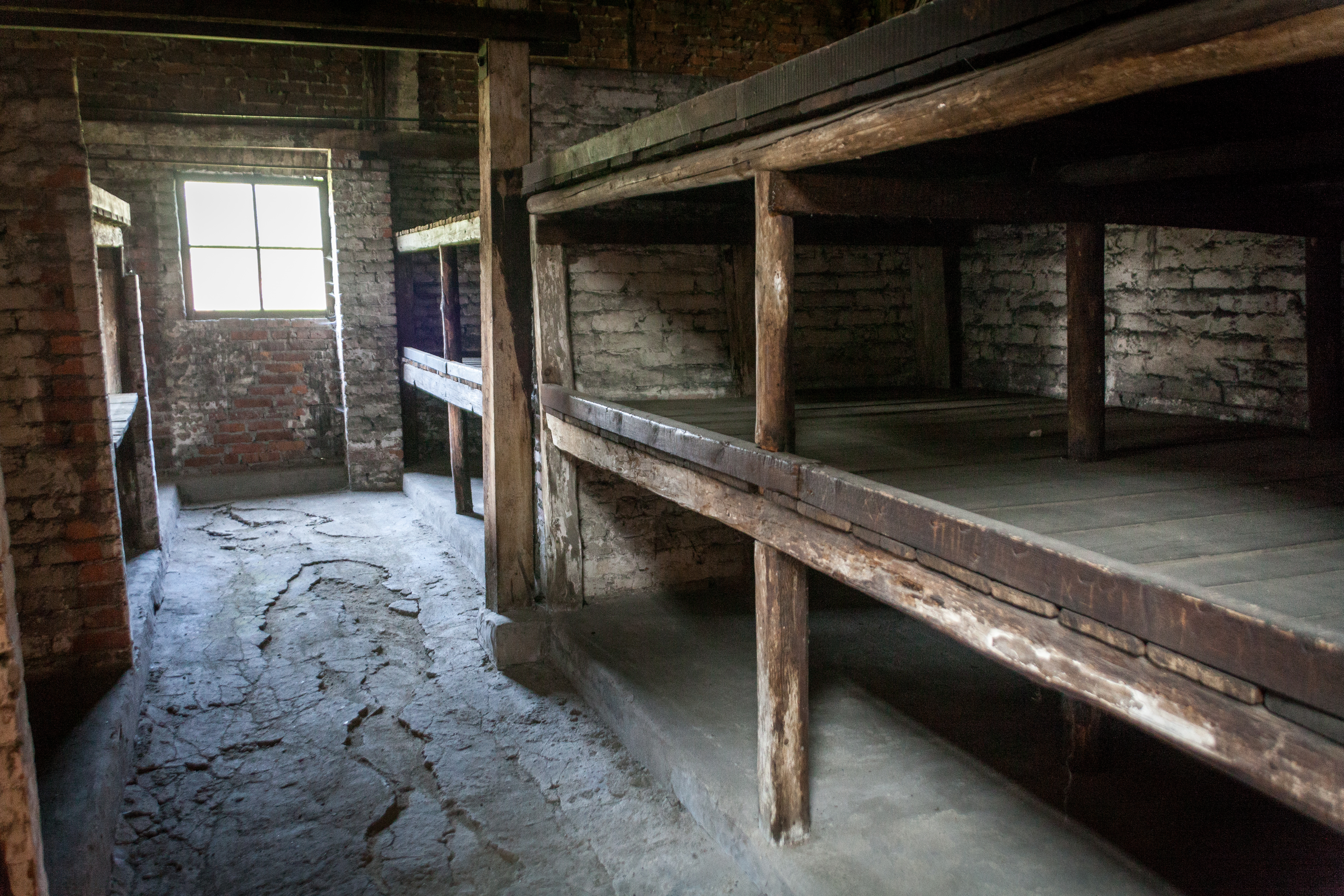 Auschwitz